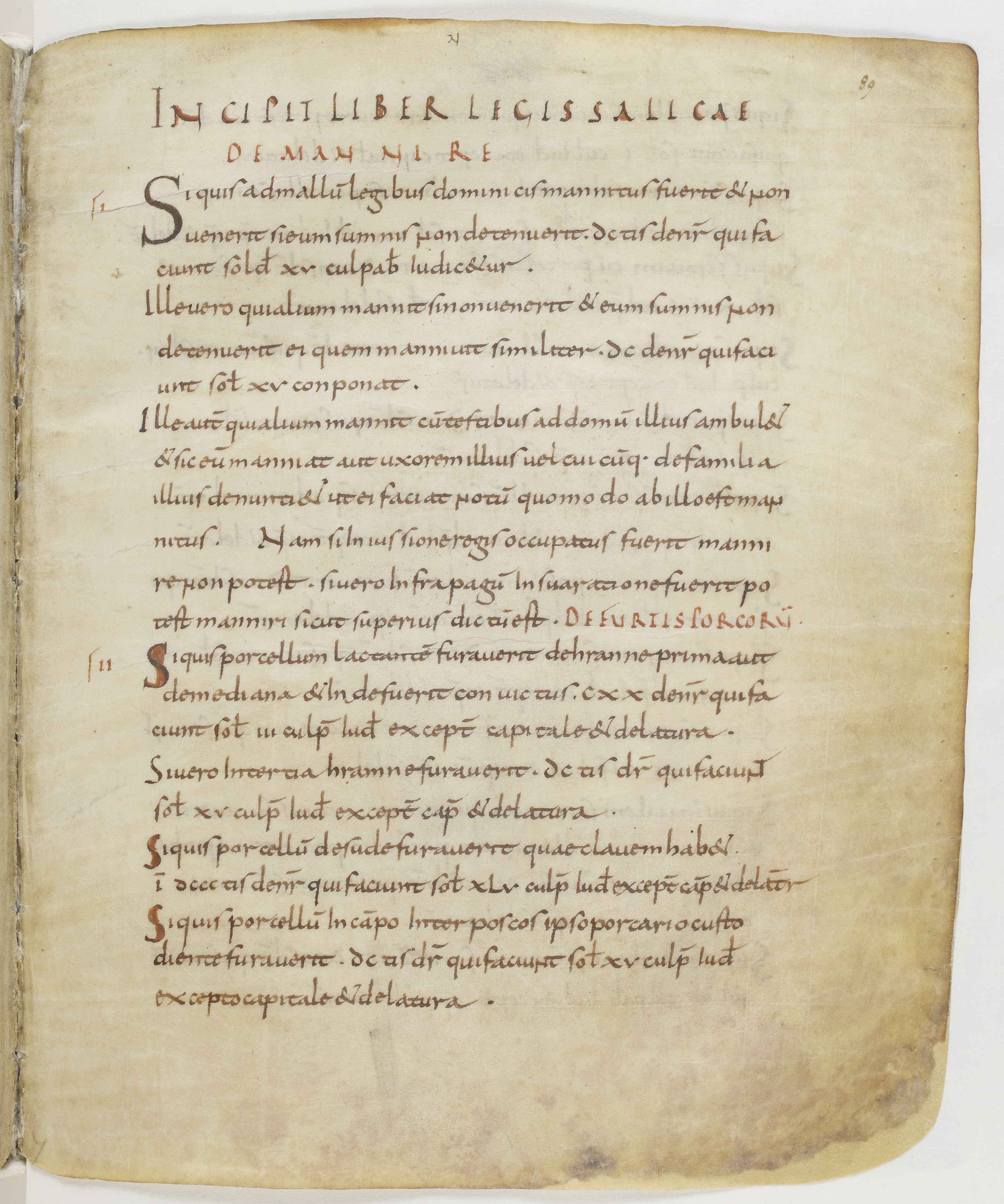 Lex Salica